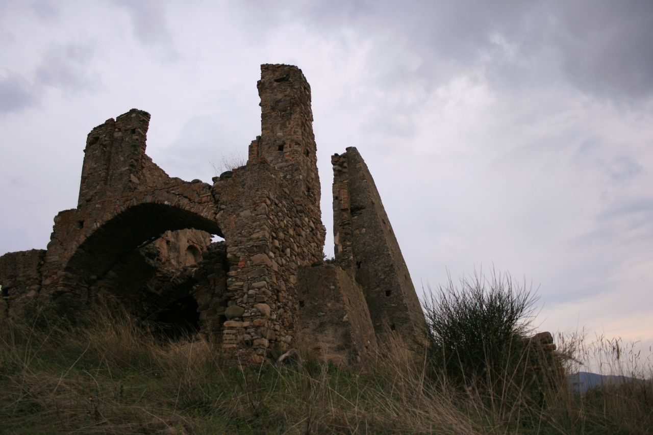 rovine di un vecchio mulino a Tursi